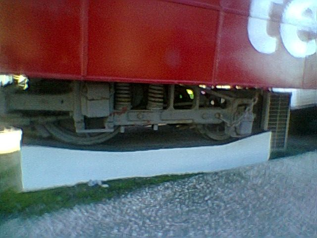 Aspeto do antigo carro elétrico CCFL 336 (tipo “xarroco”), de Lisboa, adaptado como salão de refeições, integrando a unidade de restauração ligeira “Telepizza”, em Abrantes.